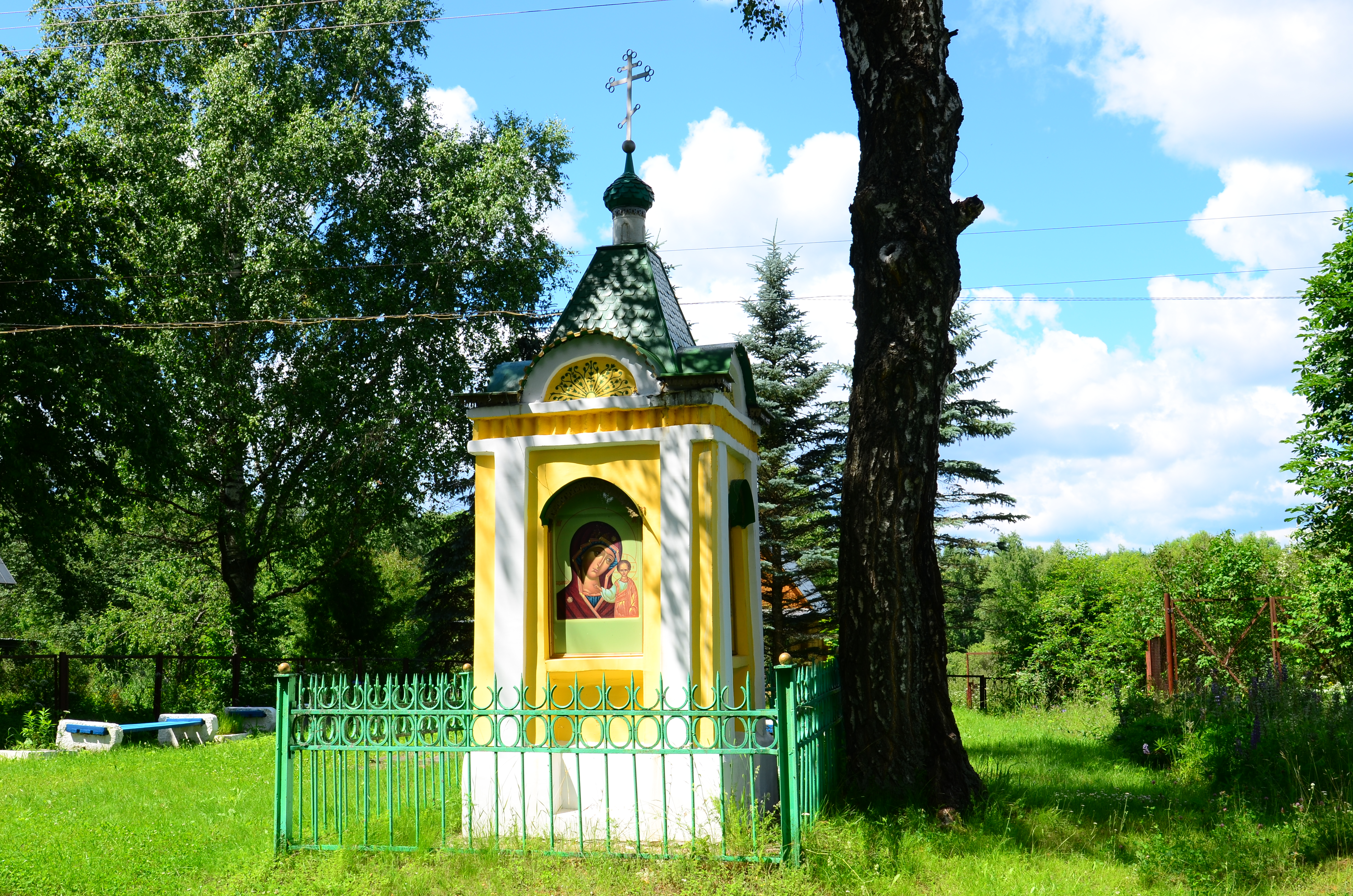 Часовня: Карабаново, Ногинский район, Московская область